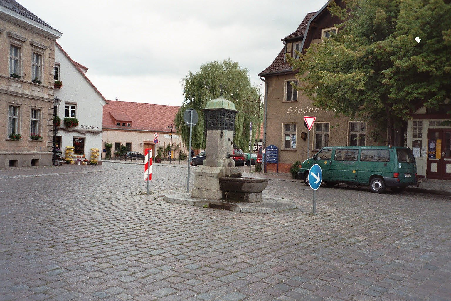 Brunnen in Buckow, Märkische Schweiz, Deutschland